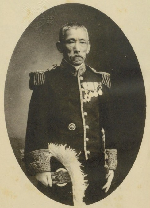 片倉健吉男爵（1870～1941）